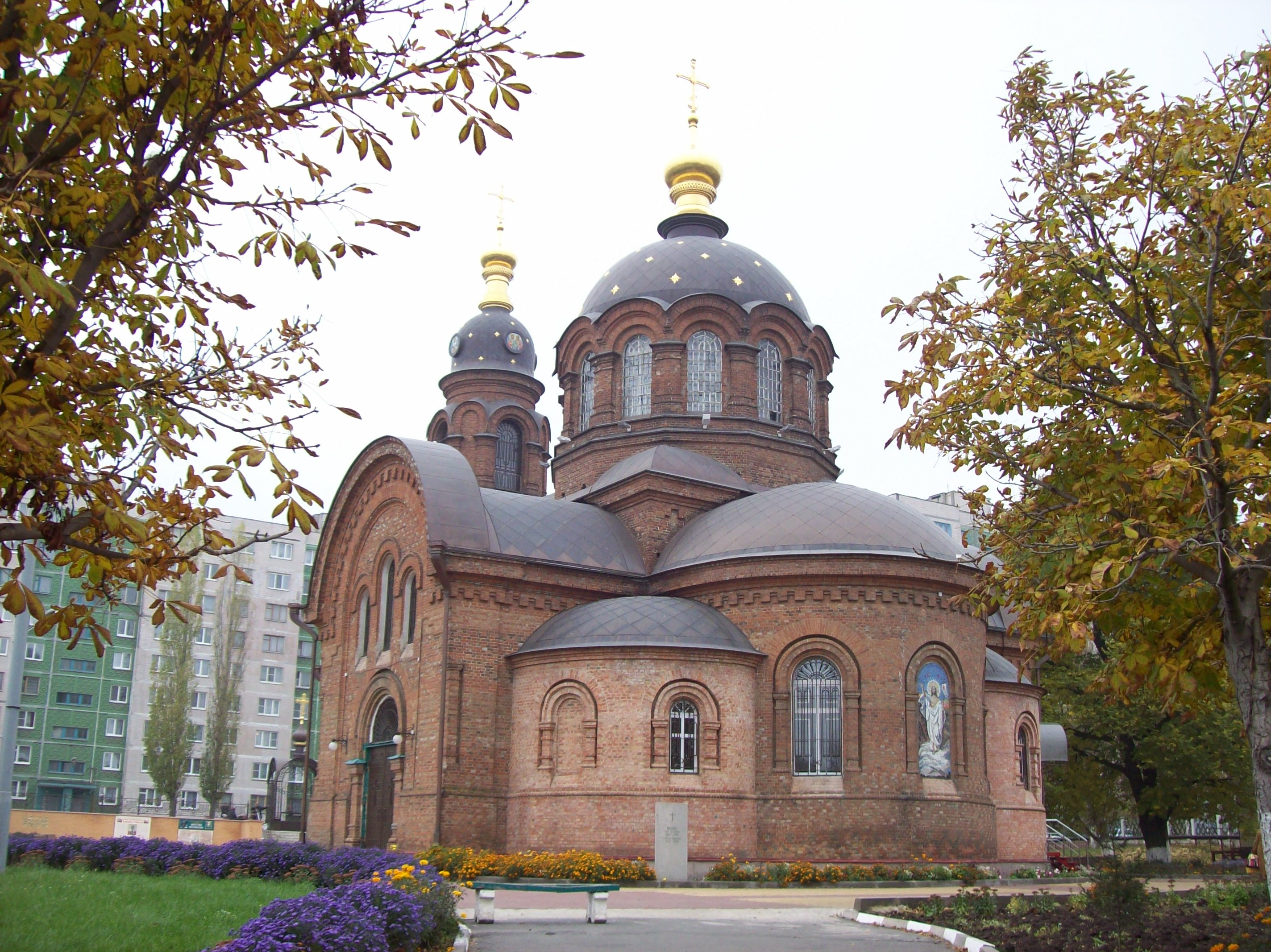 Старый Оскол. Храм Александра Невского